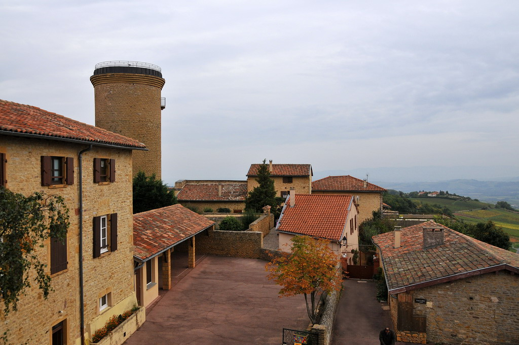 De 18m hoge toren op de achtergrond is een middeleeuwse donjon, gebouwd tussen 1181 en 1193.